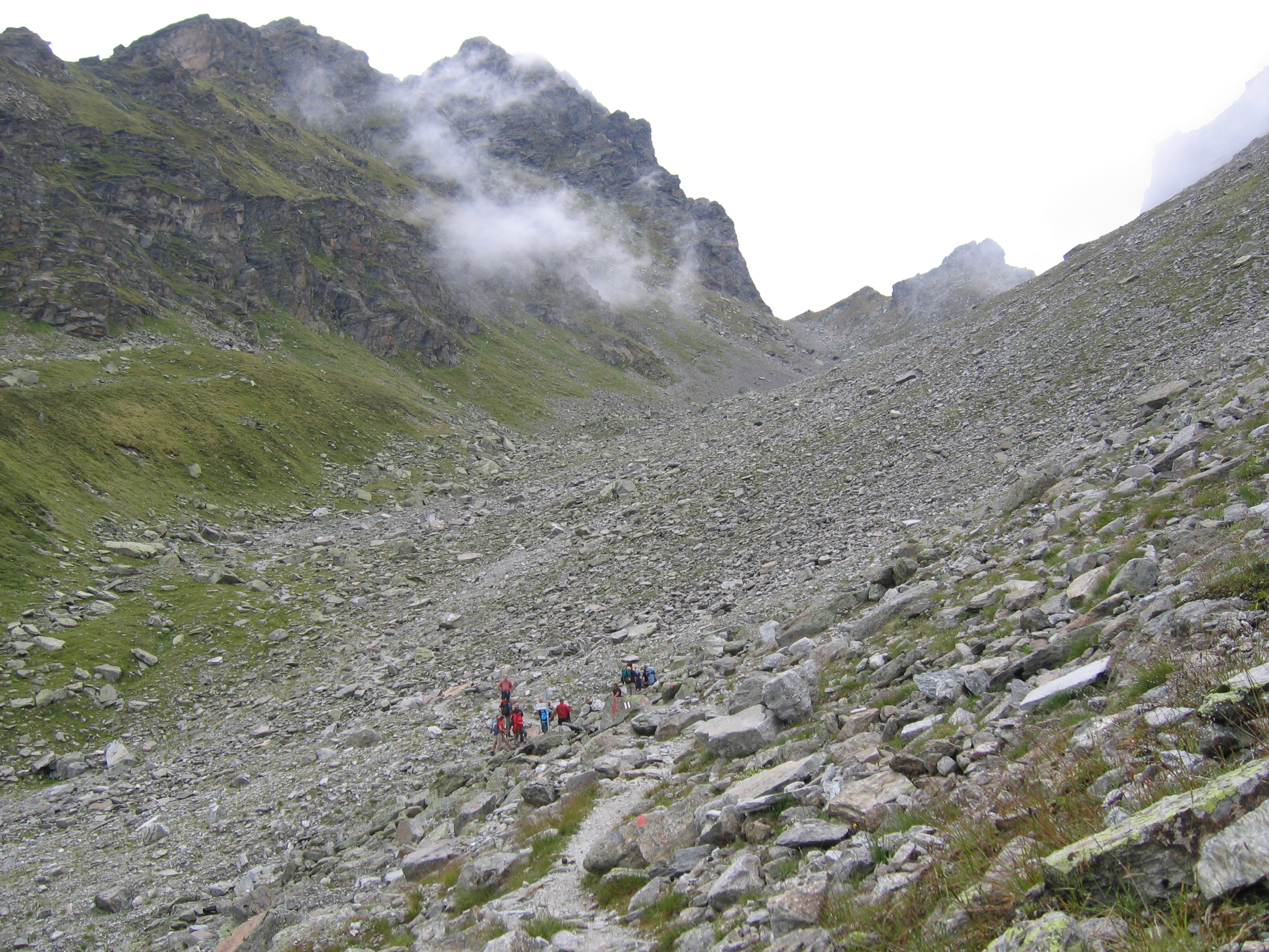 Österreich - Vorarlberg: Hochmaderer (2823 m ü. A.)